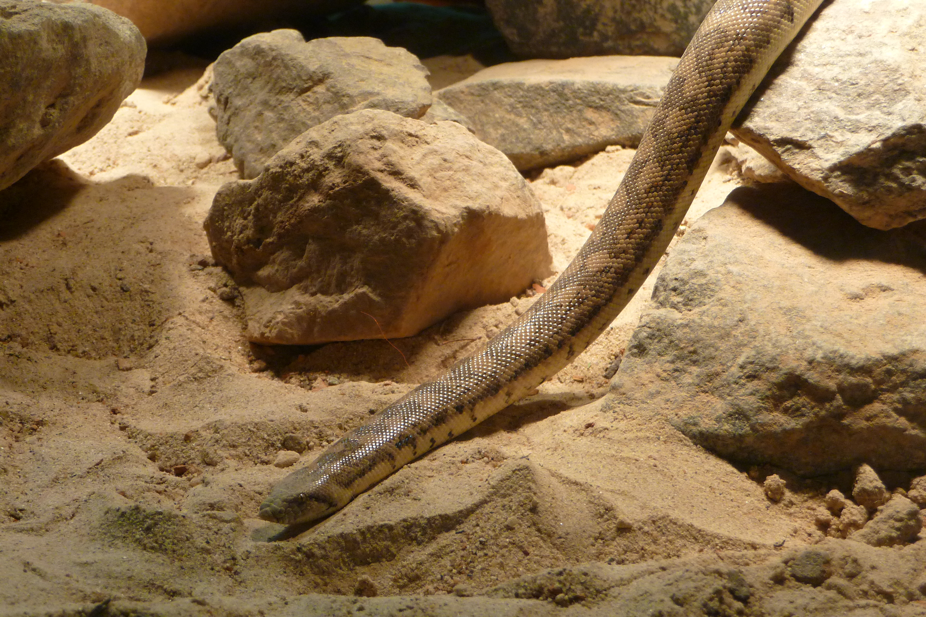 Reptilium Landau